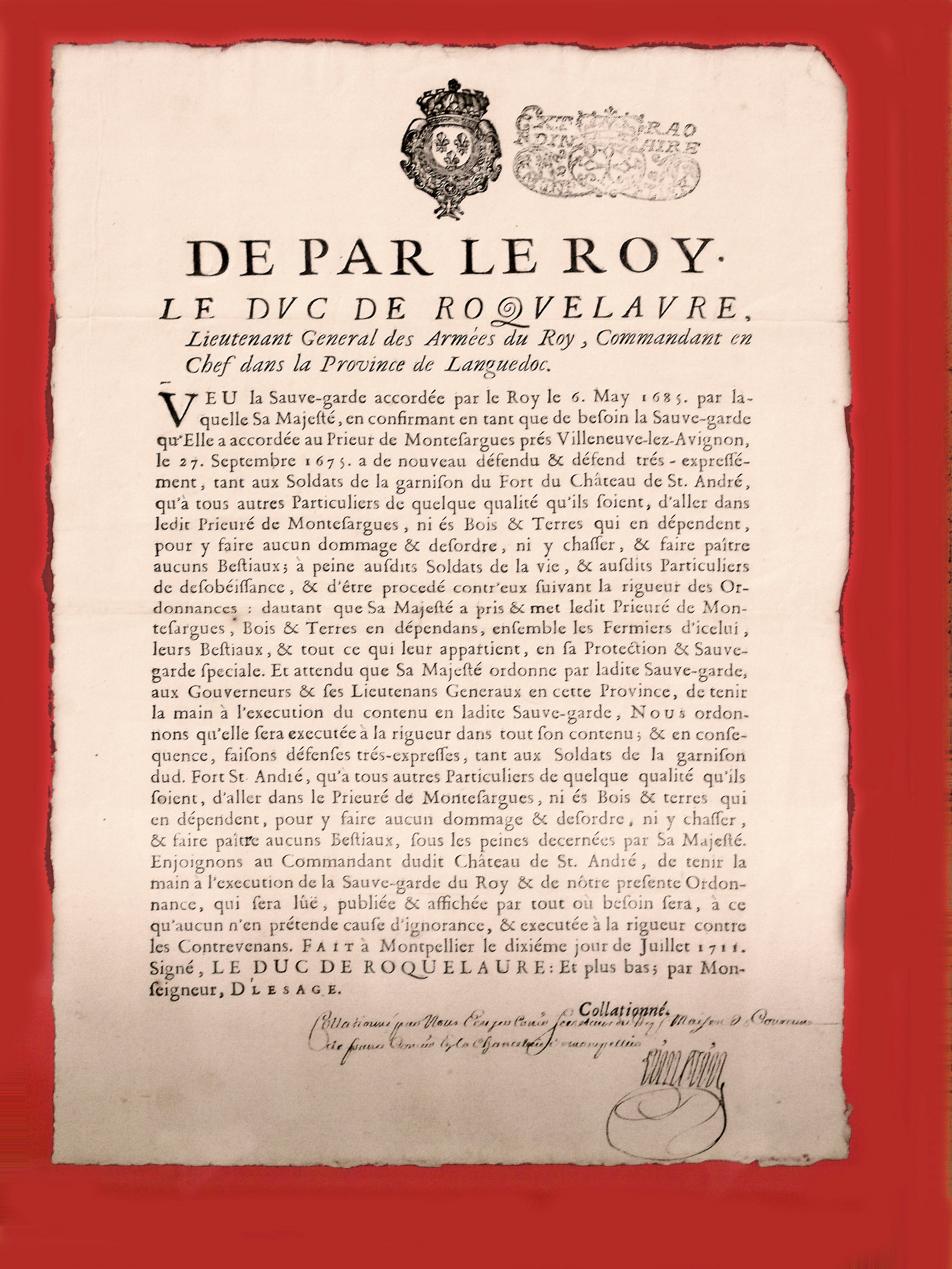 edit du prieuré de Montézargues (Tavel - 30) par le Duc de Roquelaure, signé de Louis XIV